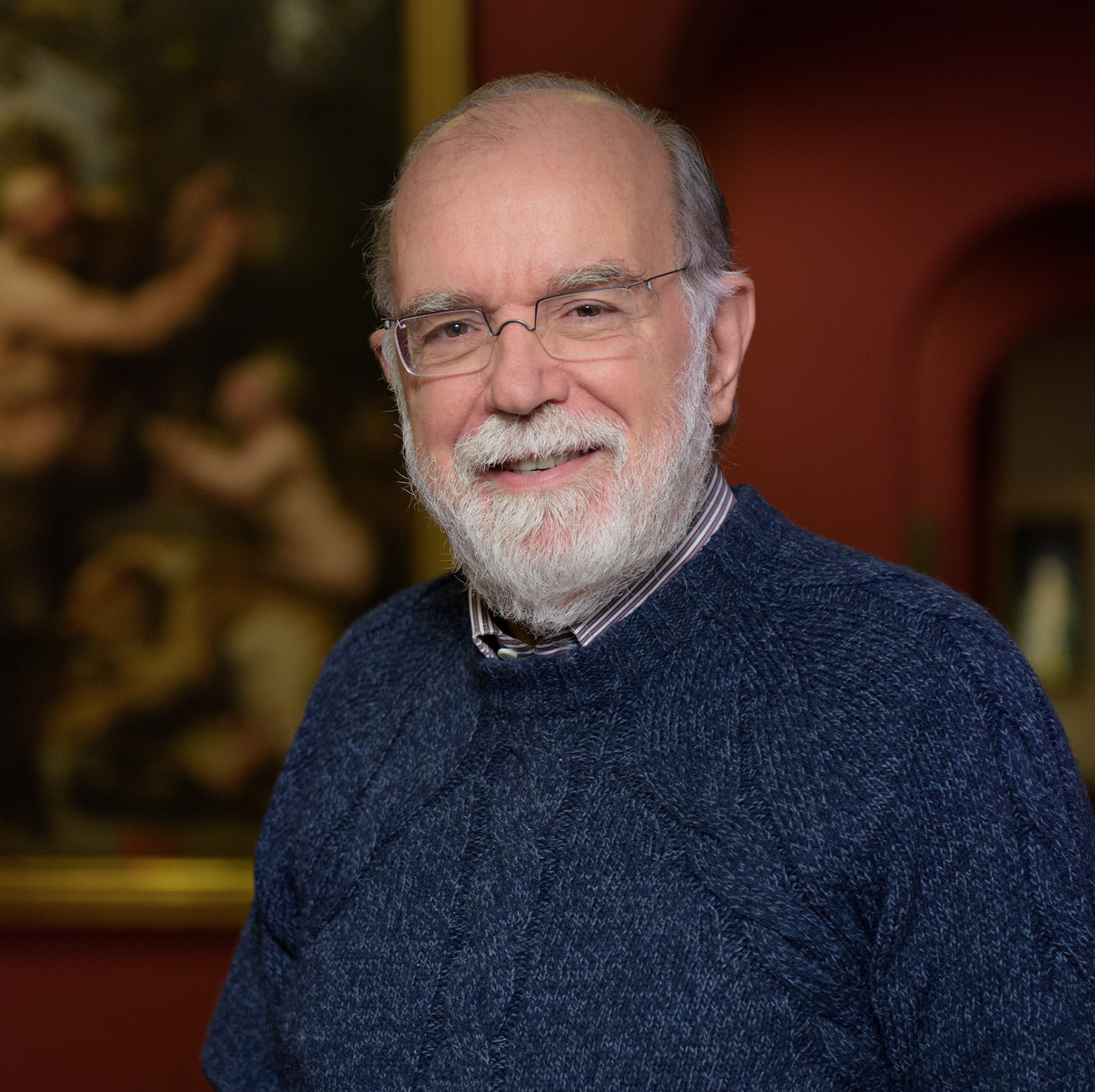 Fiorenzo Alfieri nel 2017.